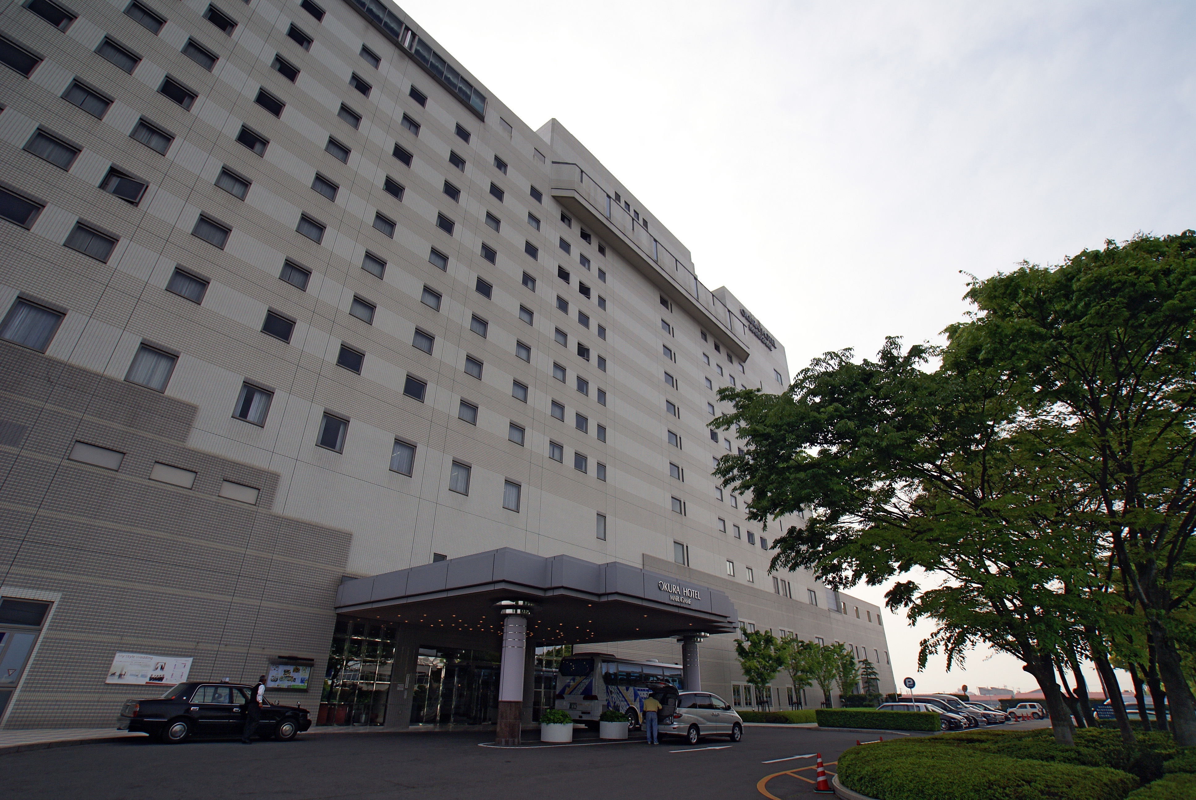 Okura Hotel Marugame in Marugame, Kagawa prefecture, Japan